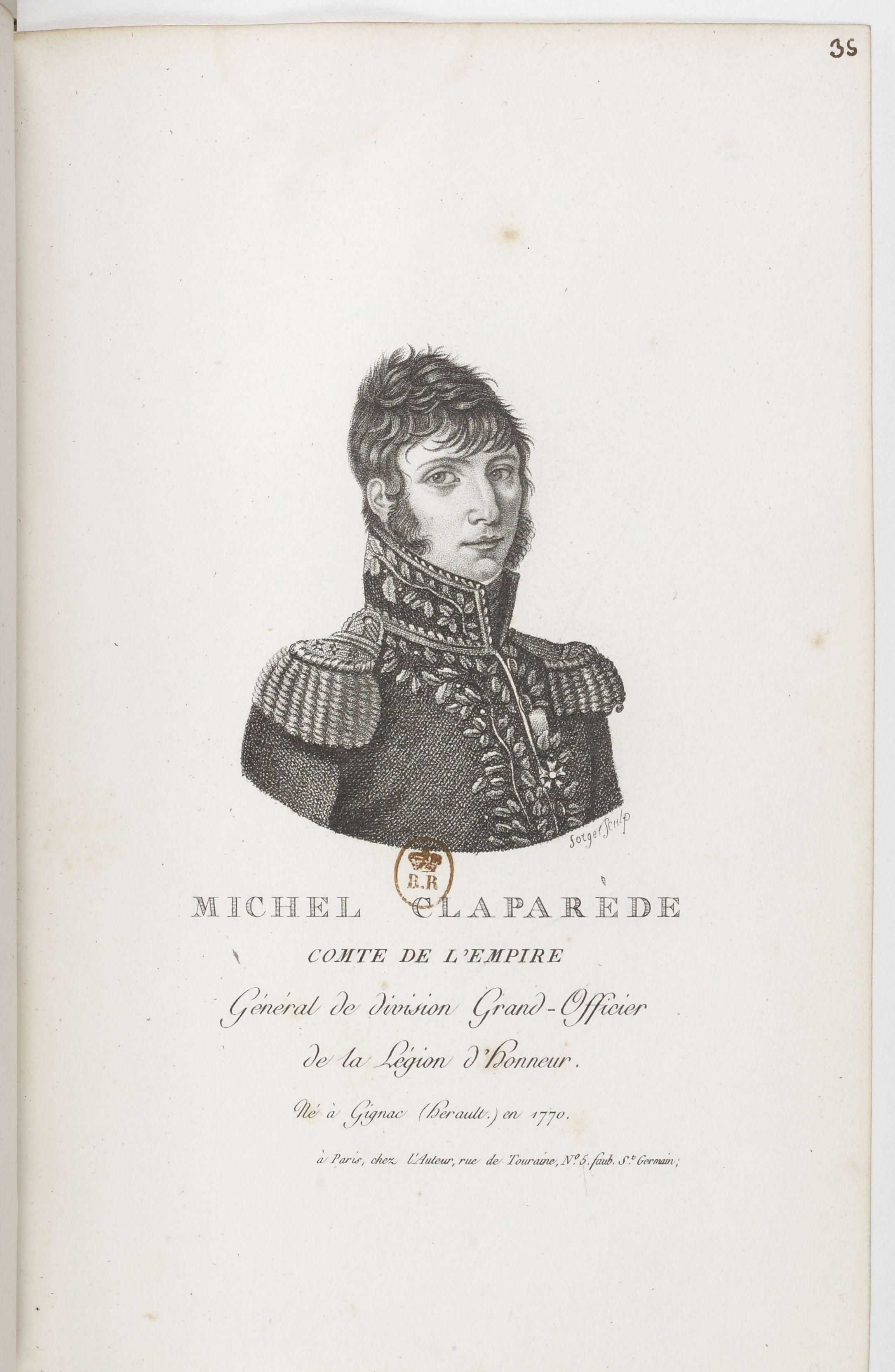 Collection complète des portraits des Grands-Aigles et des Grands-Officiers de la Légion d Honneur... / publiée par... Meyer, peintre... : vue 49 - Michel [Marie] Claparède, comte de l Empire